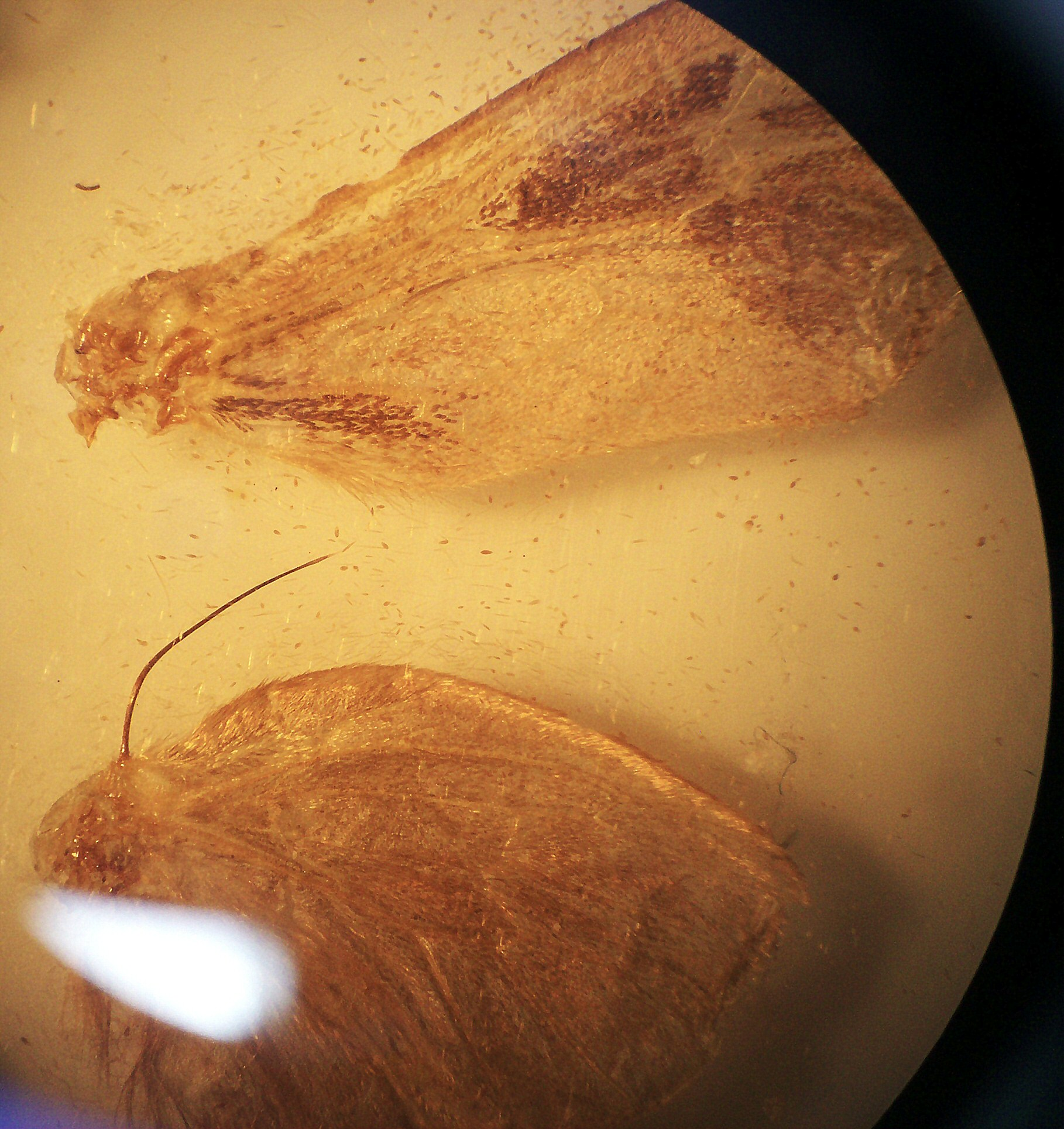 Lepidoptera, Psychidae, género Oiketicus "bichos canasto". Se ve el freno o frénulo en la parte superior del ala posterior, que engancha al ala anterior para que se desplacen juntas durante el vuelo. Aumento: 10x.